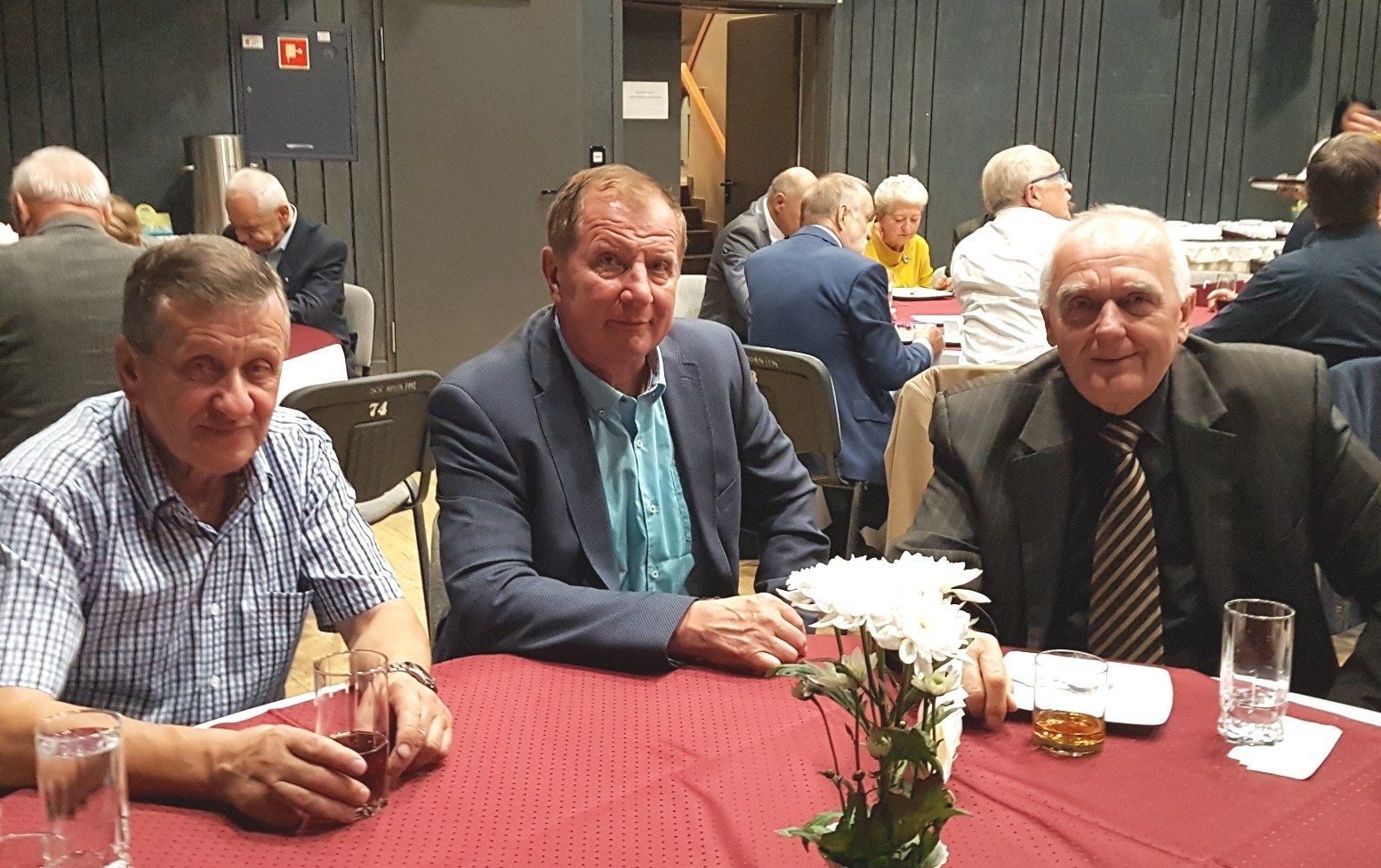 Gala jubileuszowa 70-lecie